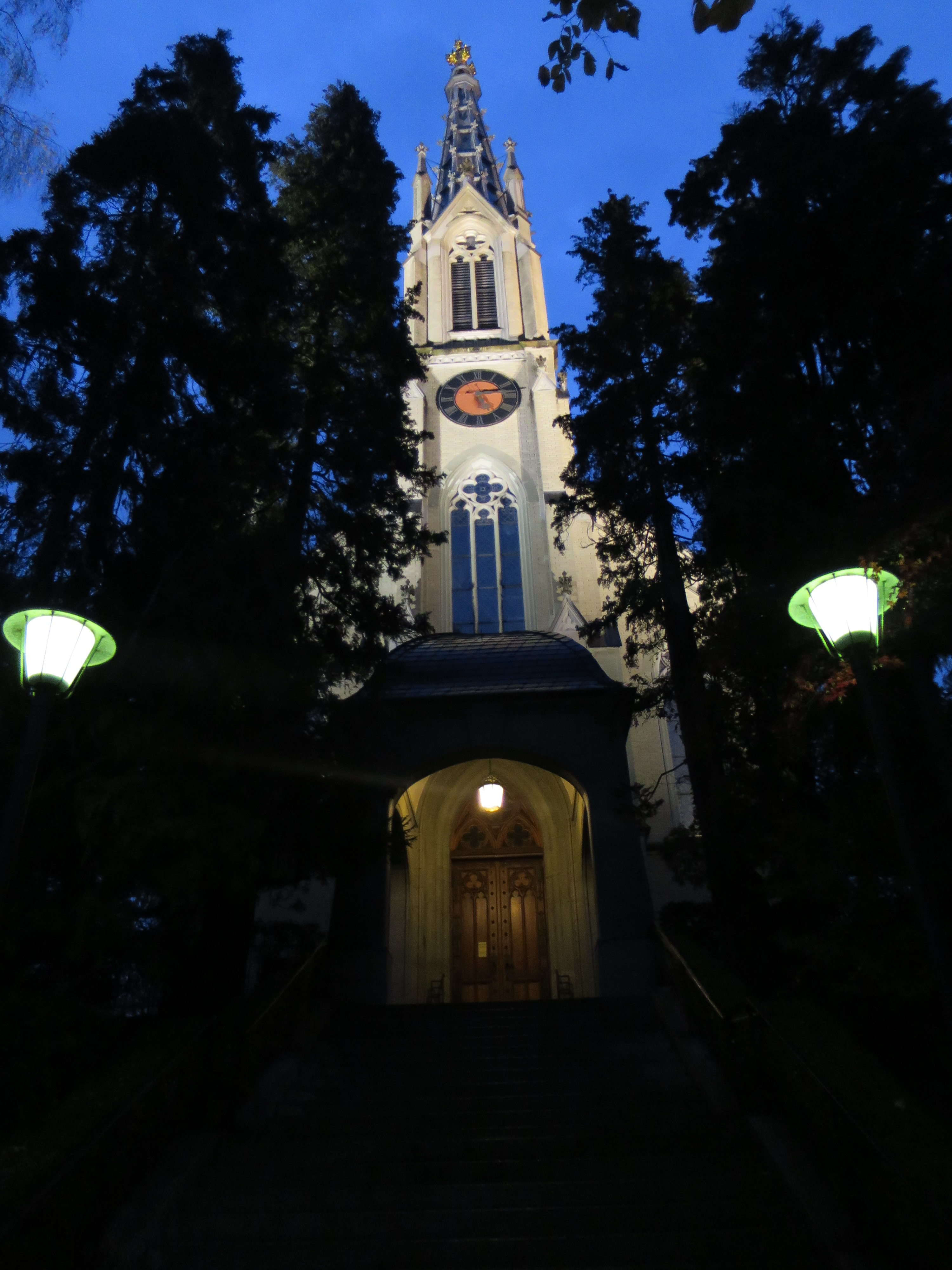 Ref. Kirche Unterstrass - Frontturm